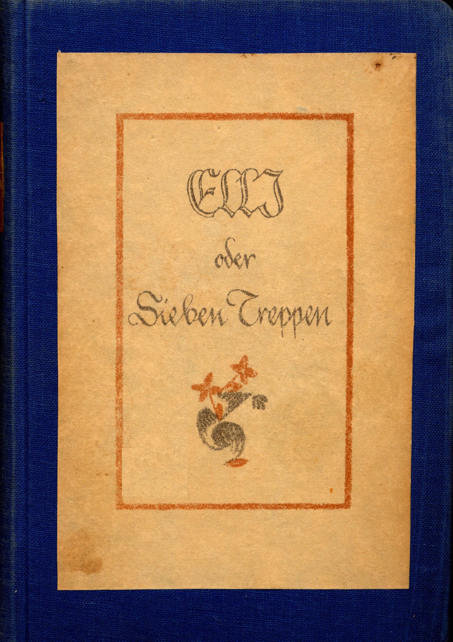 "ELLJ oder Sieben Treppen" von Albrecht Schaeffer, Insel-Verlag, Leipzig 1919